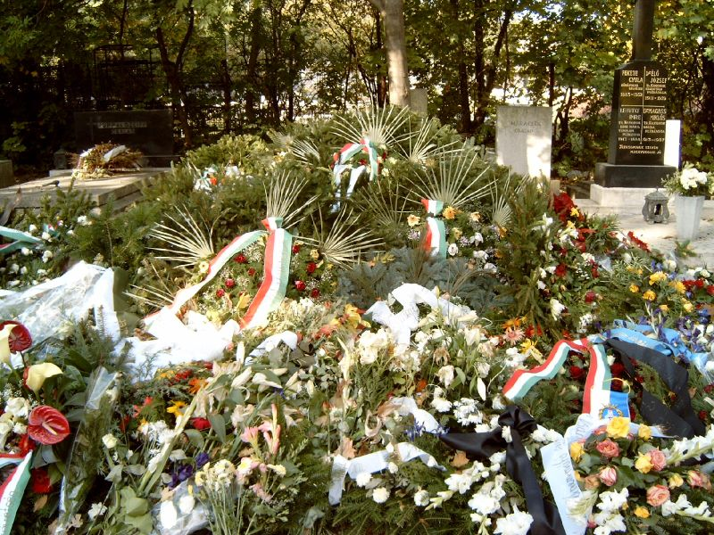 Zsivótzky Gyula sírja Budapesten. Óbudai temető: 24-I.